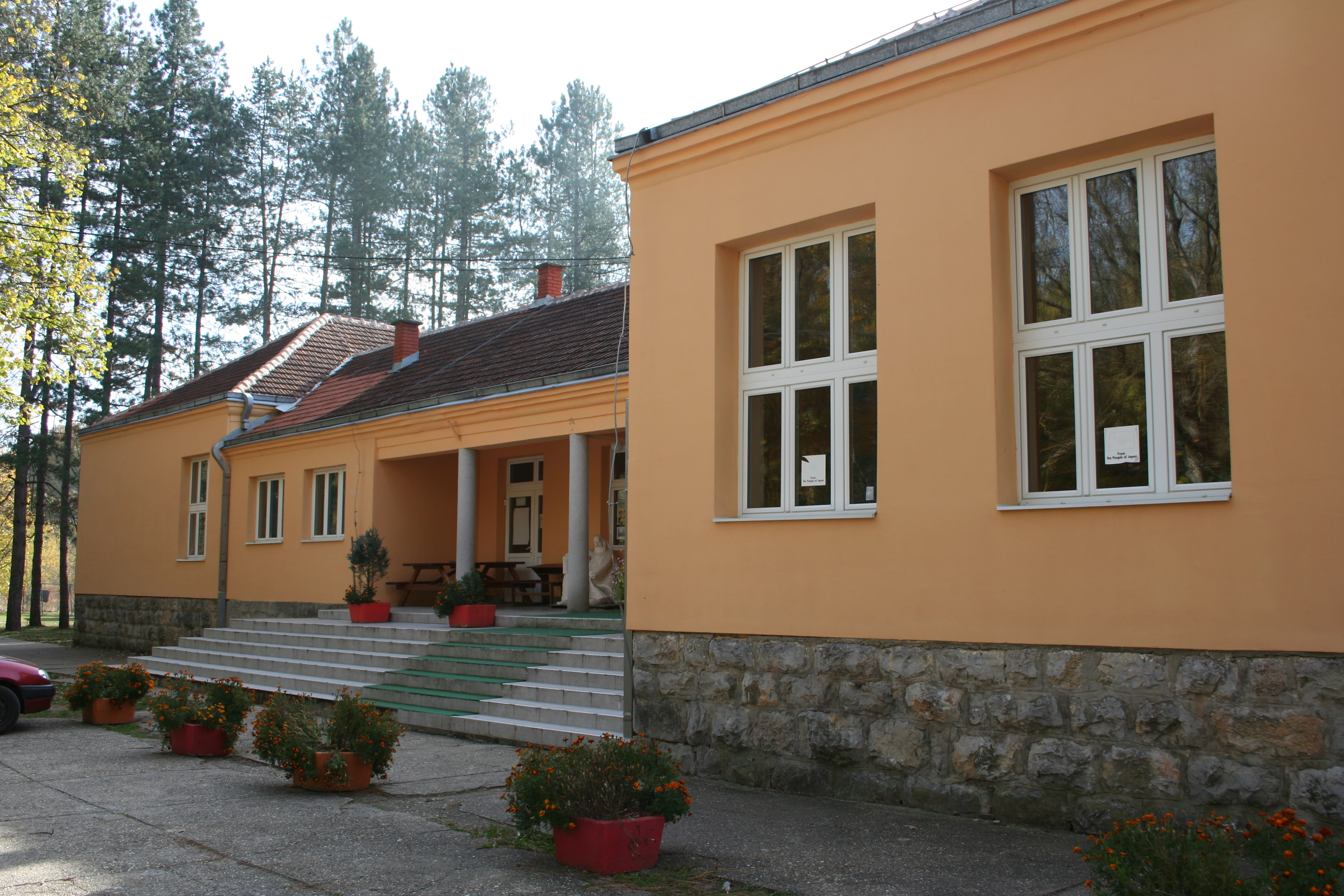 OŠ Prota Mateja Nenadović Brankovina